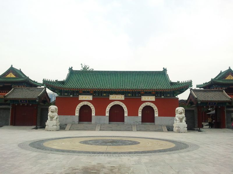 天津市大悲禅院